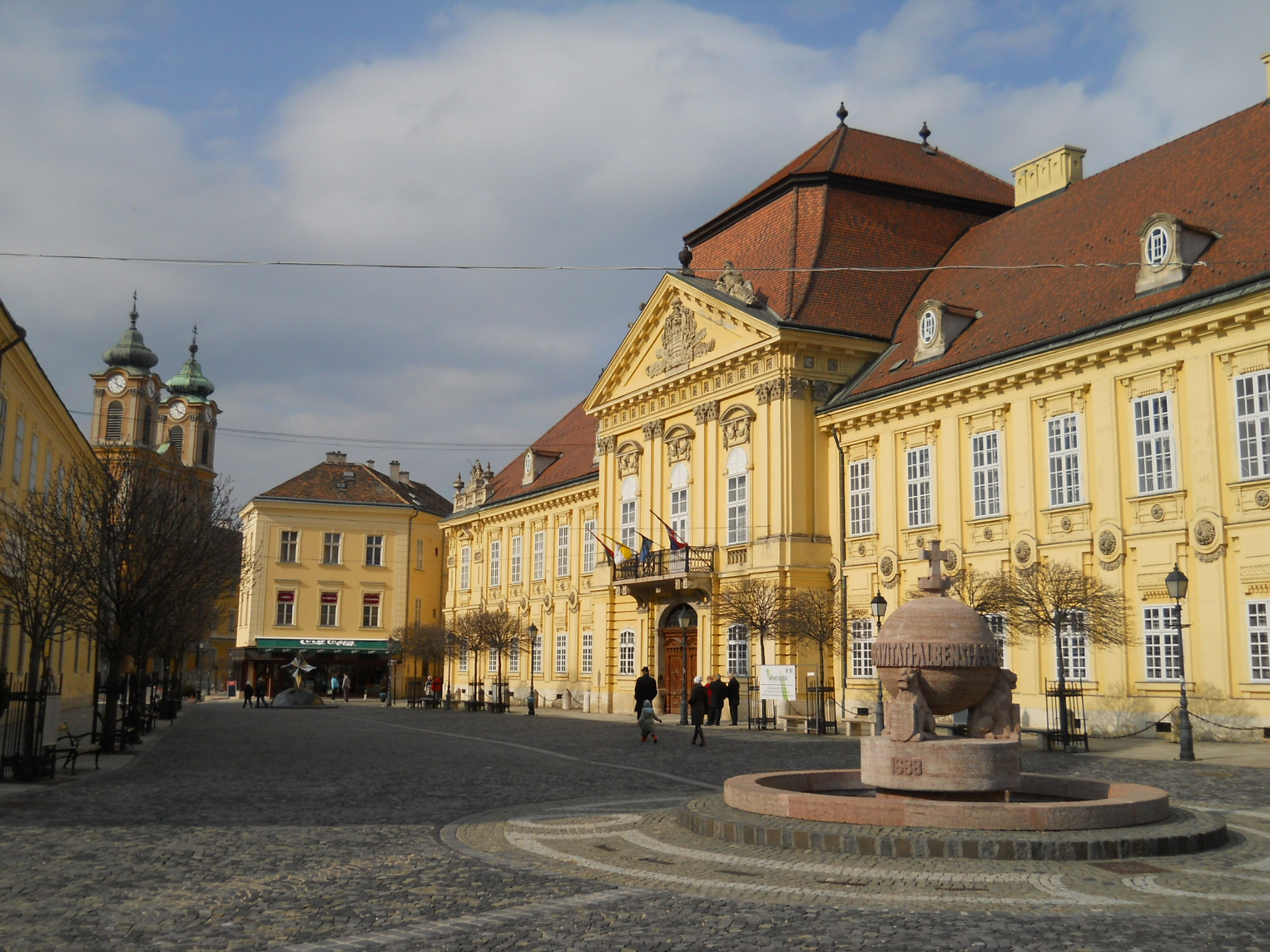 Székesfehérvár - Városház tér